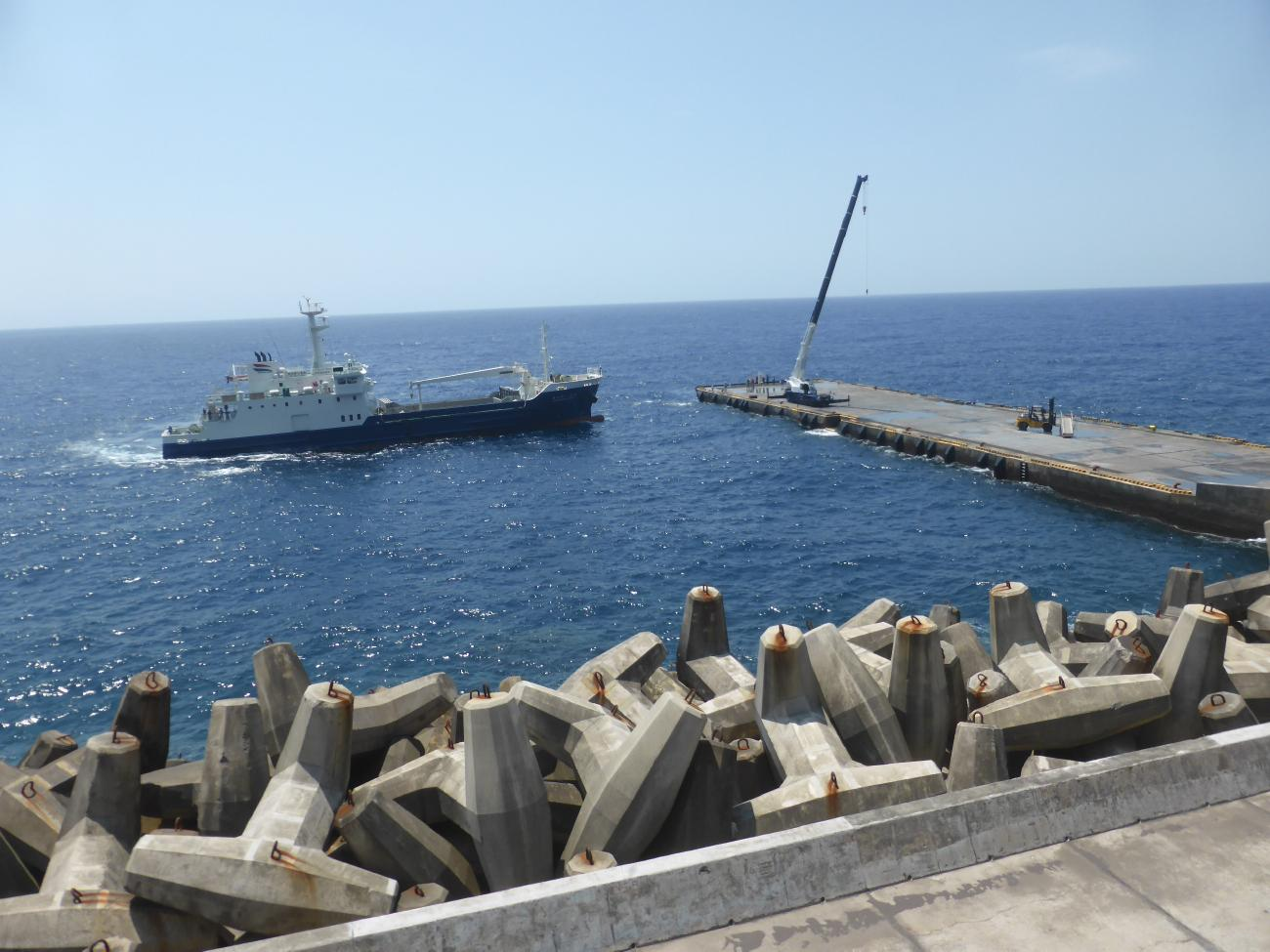 あおがしま丸全景